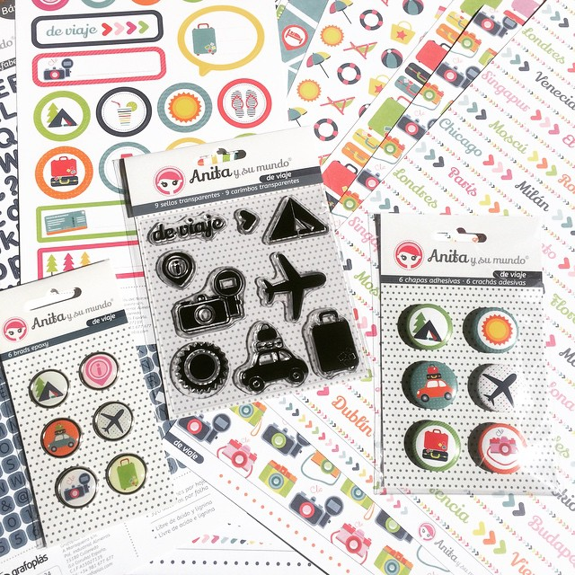 Materiales y papeles que se suelen usar en el scrapbooking.